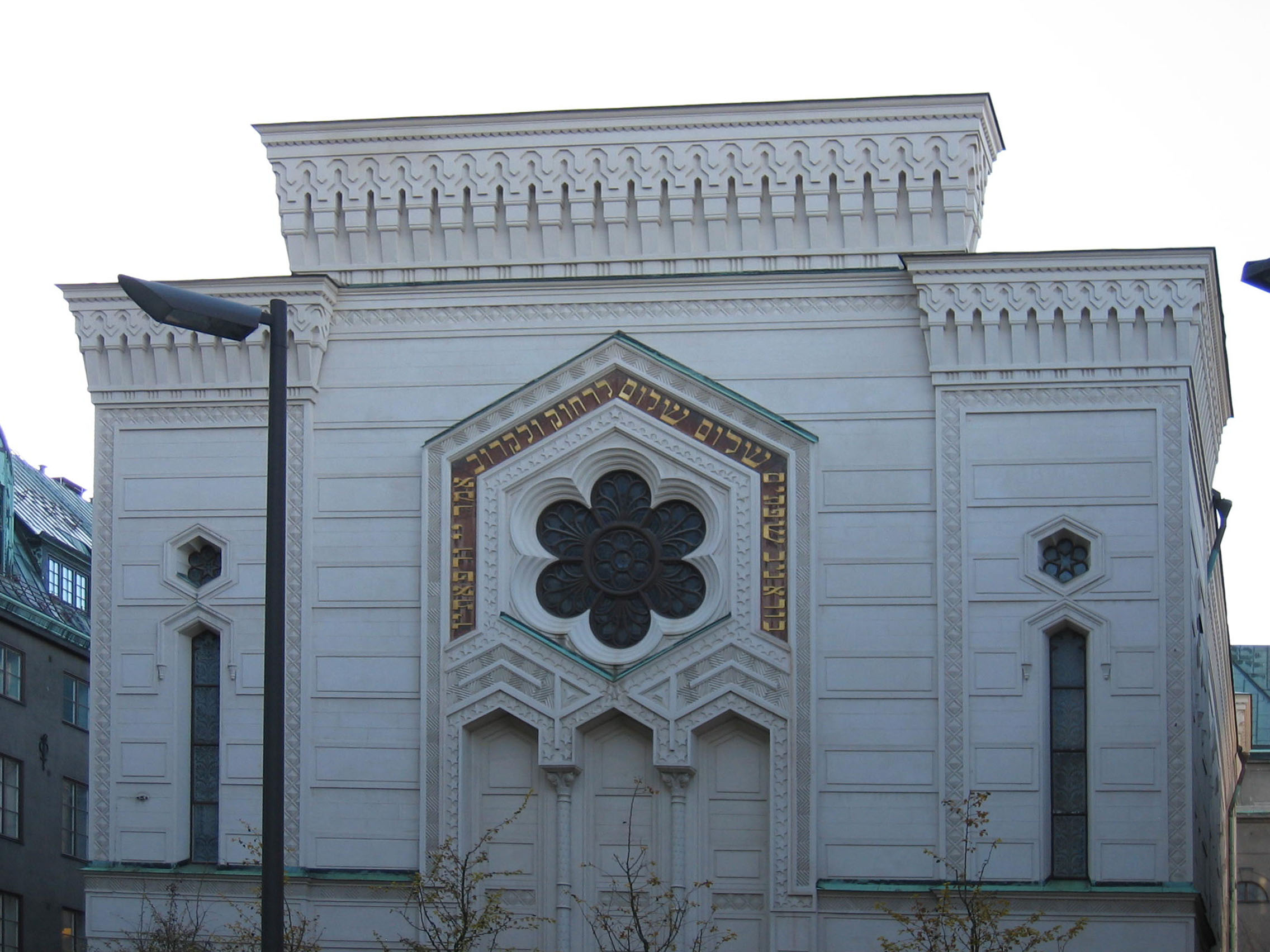 Synagogan i Stockholm. Bild tagen av mig själv, 2006 Synagogue in Stockholm, Sweden. Photograph taken by me, 2006